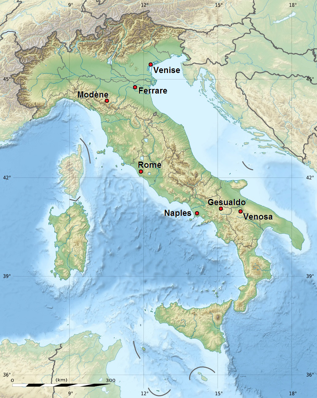 Carte Itinéraire Carlo Gesualdo